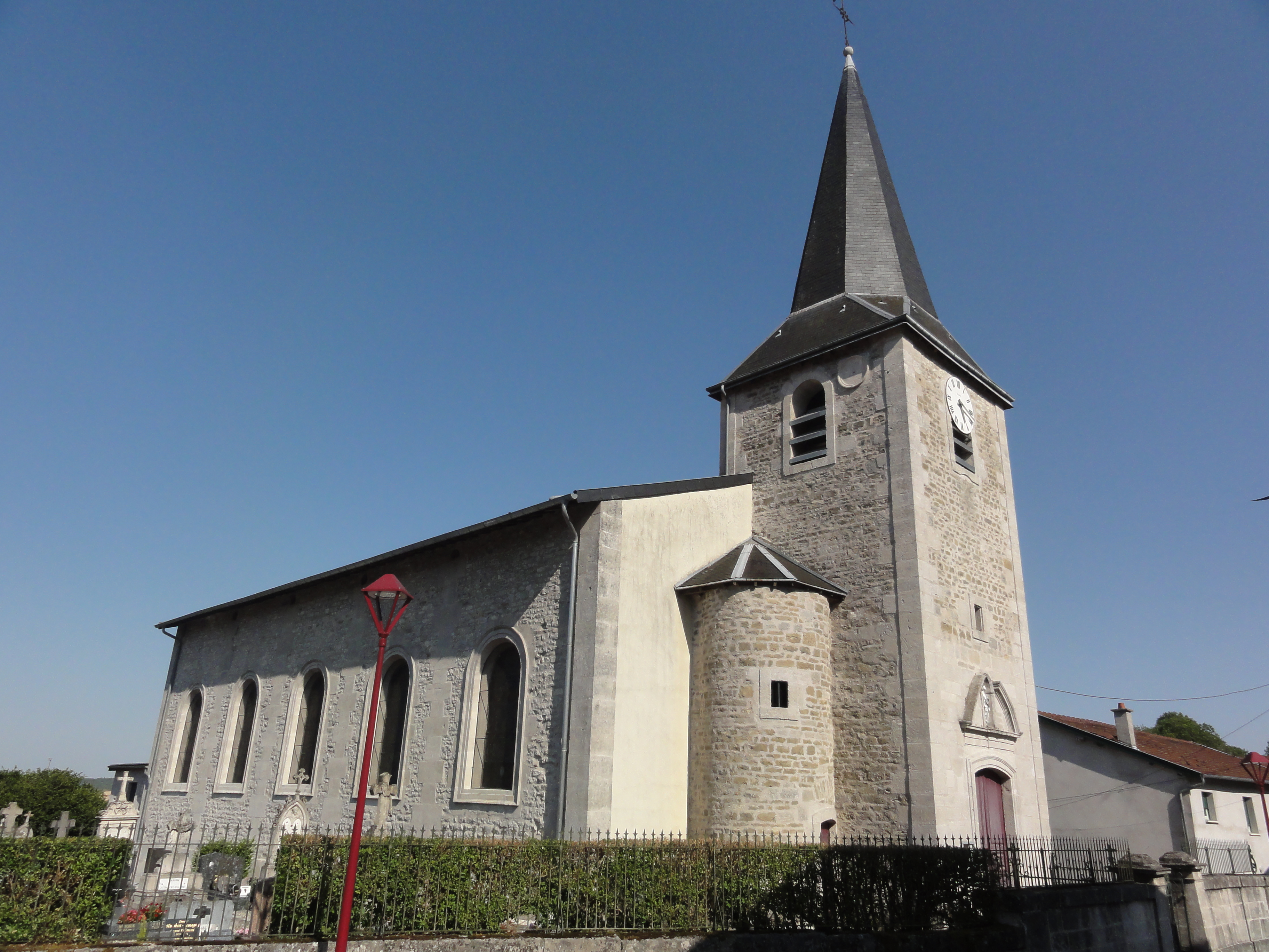 Sivry-la-Perche (Meuse) église